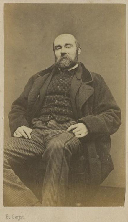 Paul Féval - photo Étienne Carjat - carte de visite